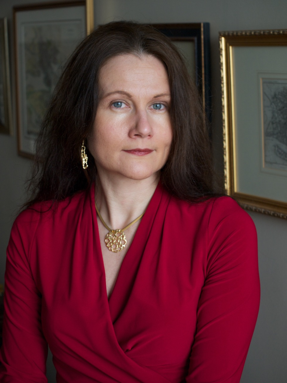 Foto: TIXE